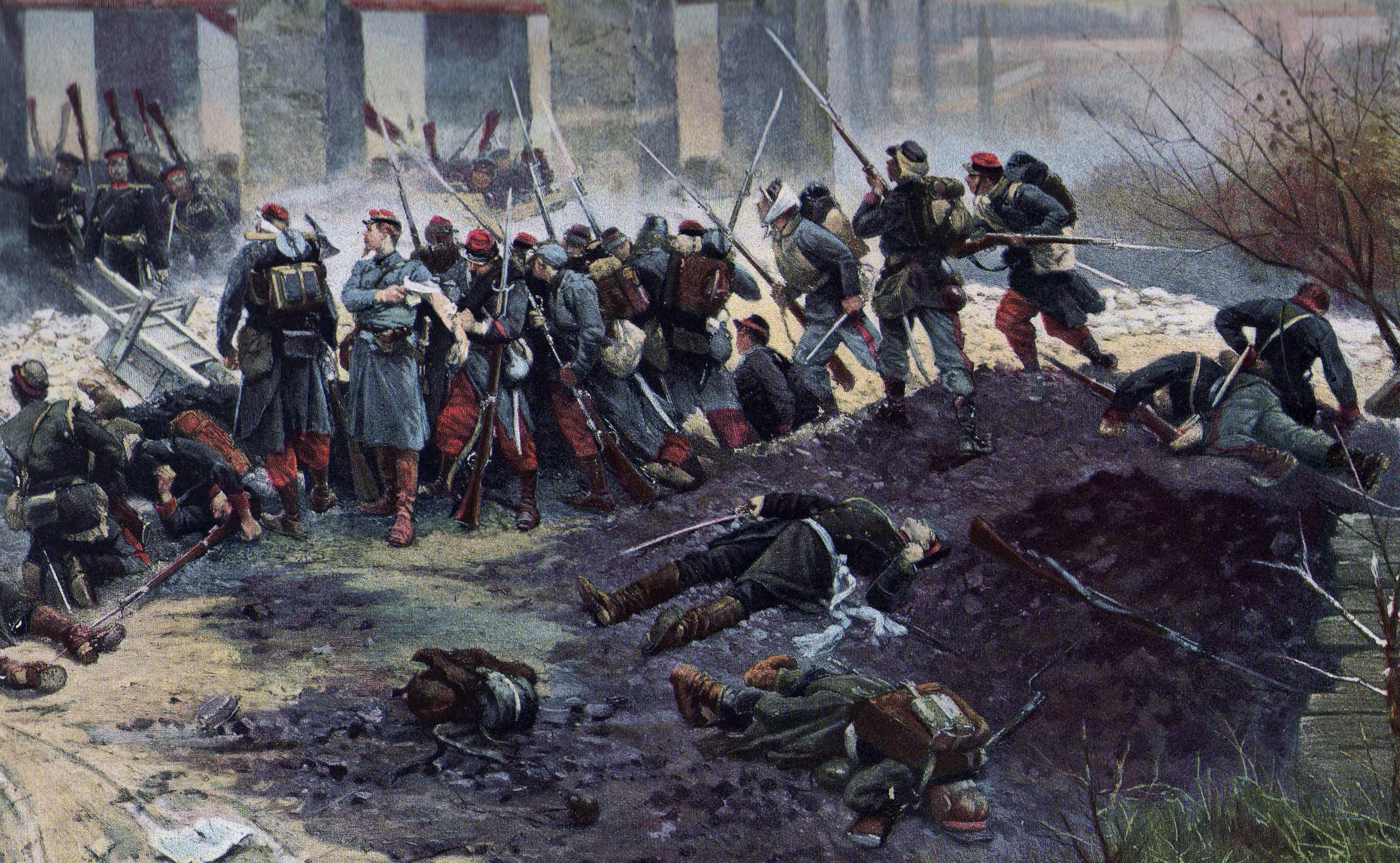 Le four à chaux (détail). Fragment de La Bataille de Champigny, panorama d'Alphonse de Neuville et Édouard Detaille.